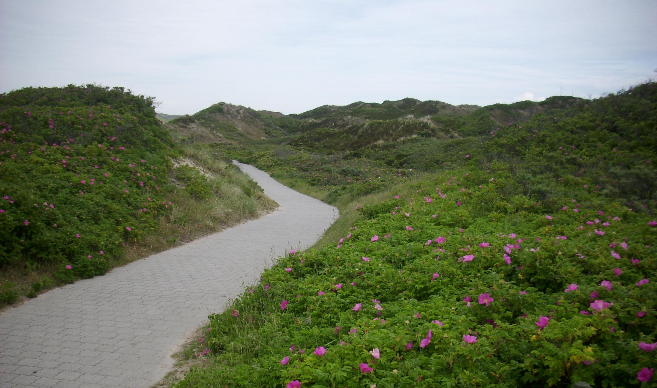 Dünenlandschaft im Pirolatal auf Langeoog